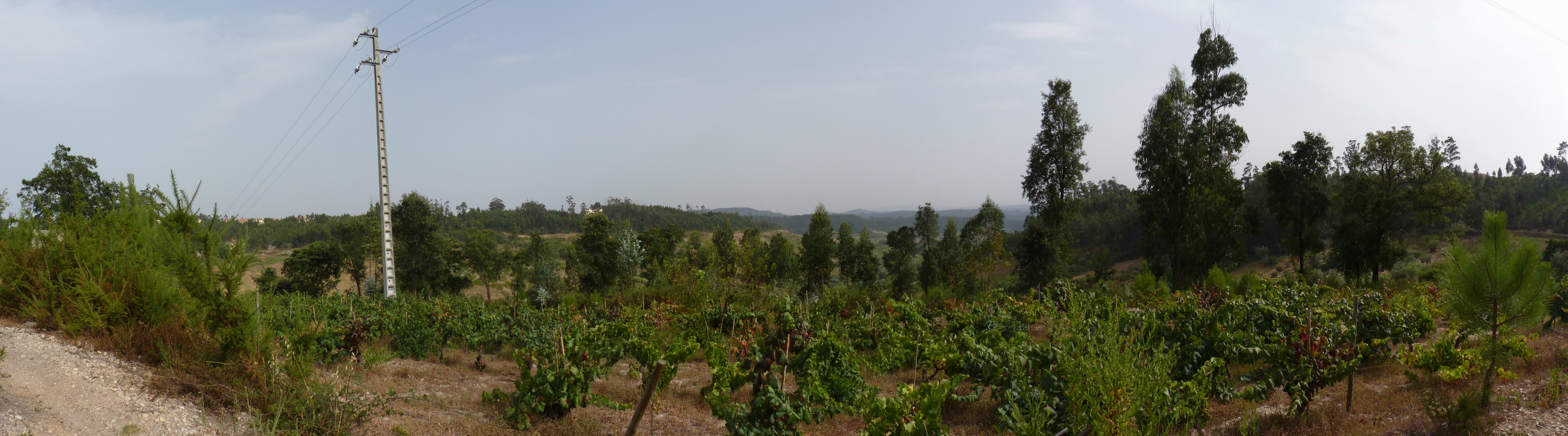 Um panorama das vinhas da Cumieira.